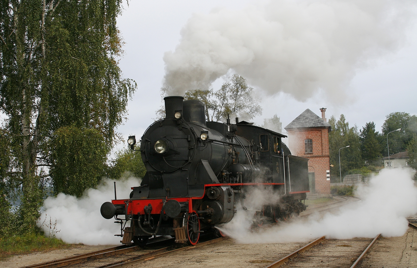 Damplokomotiv type 24b nr. 236 på Krøderen stasjon